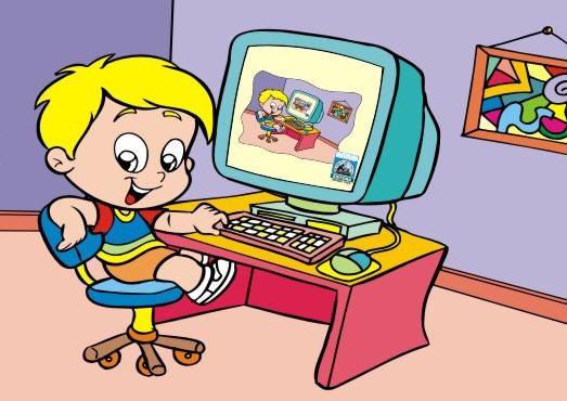 Un sistema informático es un conjunto de partes que funcionan relacionándose entre sí con un objetivo preciso. Sus partes son: hardware, software y las personas que lo usan. Por ejemplo, una computadora, sus dispositivos periféricos y la persona que la maneja, pueden constituir un sistema informático. Un sistema informático puede formar parte de un sistema de información; en este último la información, uso y acceso a la misma, no necesariamente está informatizada. Por ejemplo, el sistema de archivo de libros de una biblioteca y su actividad en general es un sistema de información. Si dentro del sistema de información hay computadoras que ayudan en la tarea de organizar la biblioteca, estonces ese es un sistema informático. Diferencia entre sistema informático y sistema de información En un sistema informático se utilizan computadoras para almacenar, procesar y/o acceder a información. En un sistema de información se pueden utilizar computadoras, pero no es necesario. El acceso a la información puede ser físico (por ejemplo, una persona se encarga de buscar en un archivador). Tanto el sistema informático como el sistema de información, incluyen a las personas que acceden o producen información dentro del sistema. Las personas tienen que capacitarse para enteder el funcionamiento y procedimientos que soporta sistema. Ambos sistemas tienen un propósito. Por ejemplo, gestionar el acceso y distribución de libros una biblioteca, administrar la entrada/salida de mercadería, personal y otros recursos de un comercio, etc.